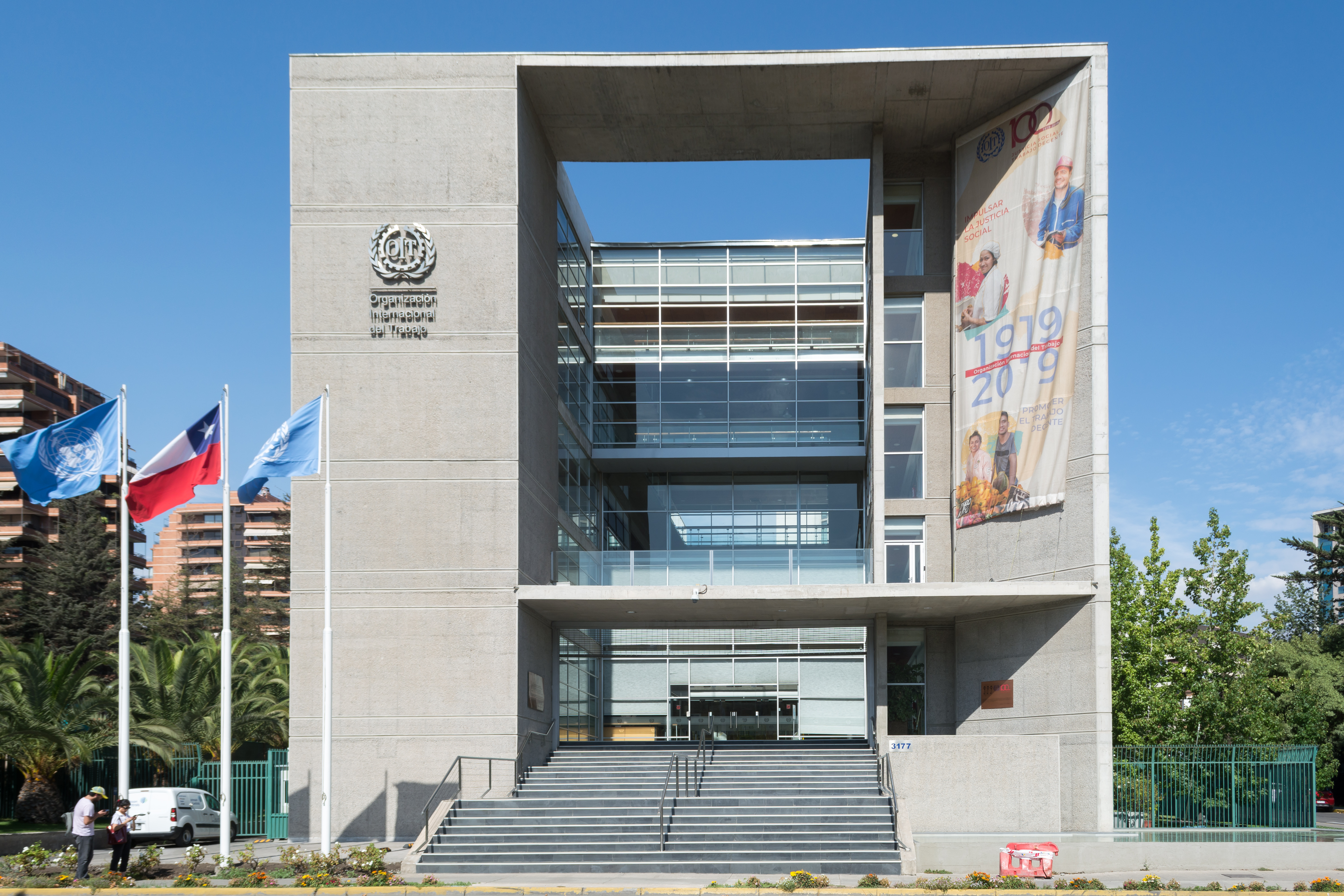 OIT Santiago, Vitacura, Santiago, Región Metropolitana, Chile